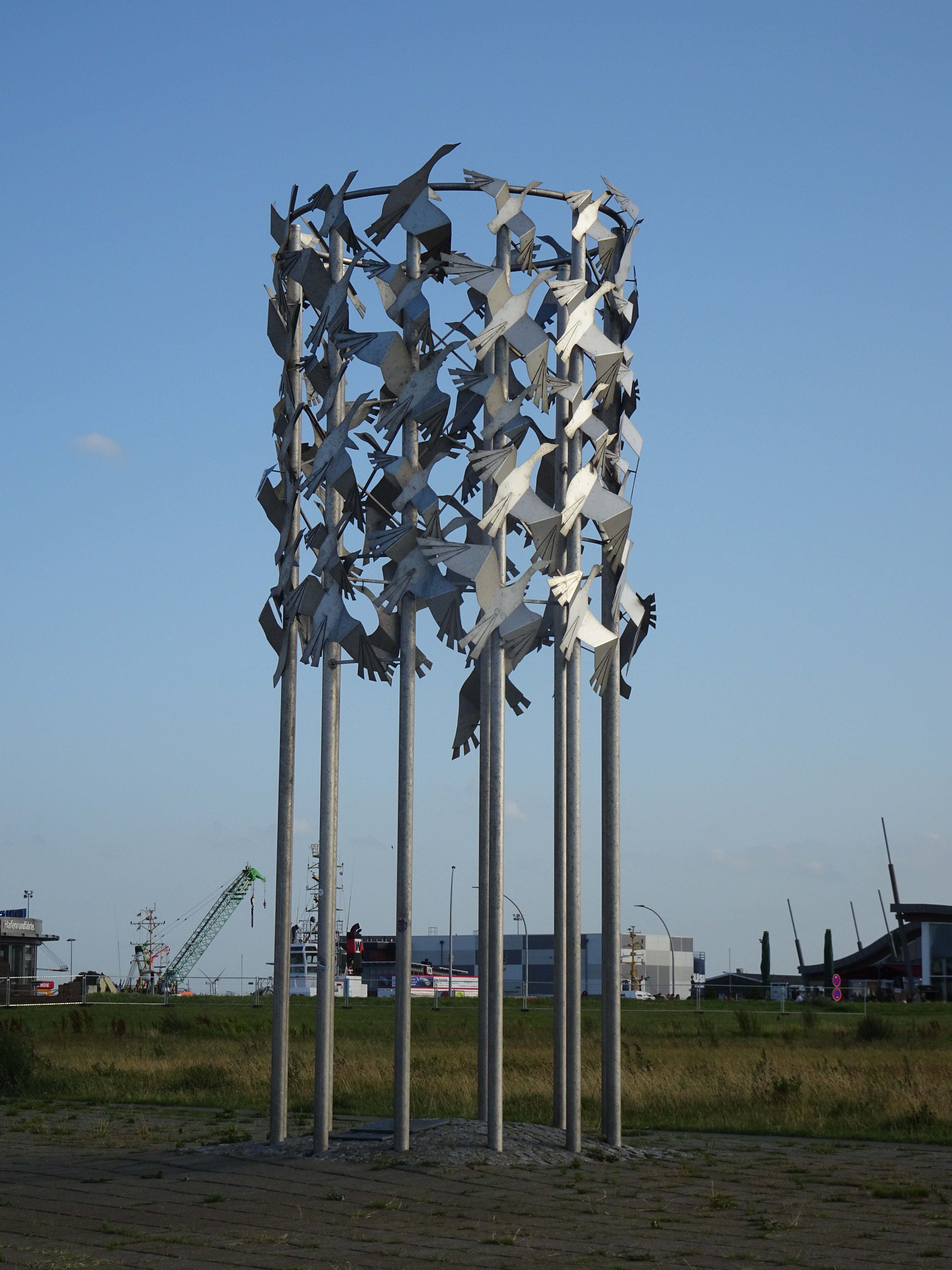 Skulptur Vogelflug in Cuxhaven, Nähe Alte Liebe